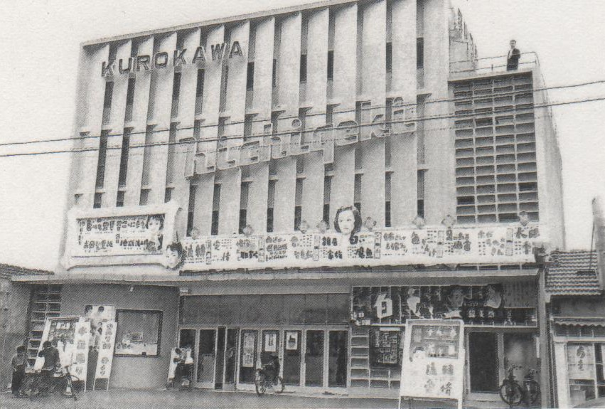 名古屋市北区にあった黒川日劇。